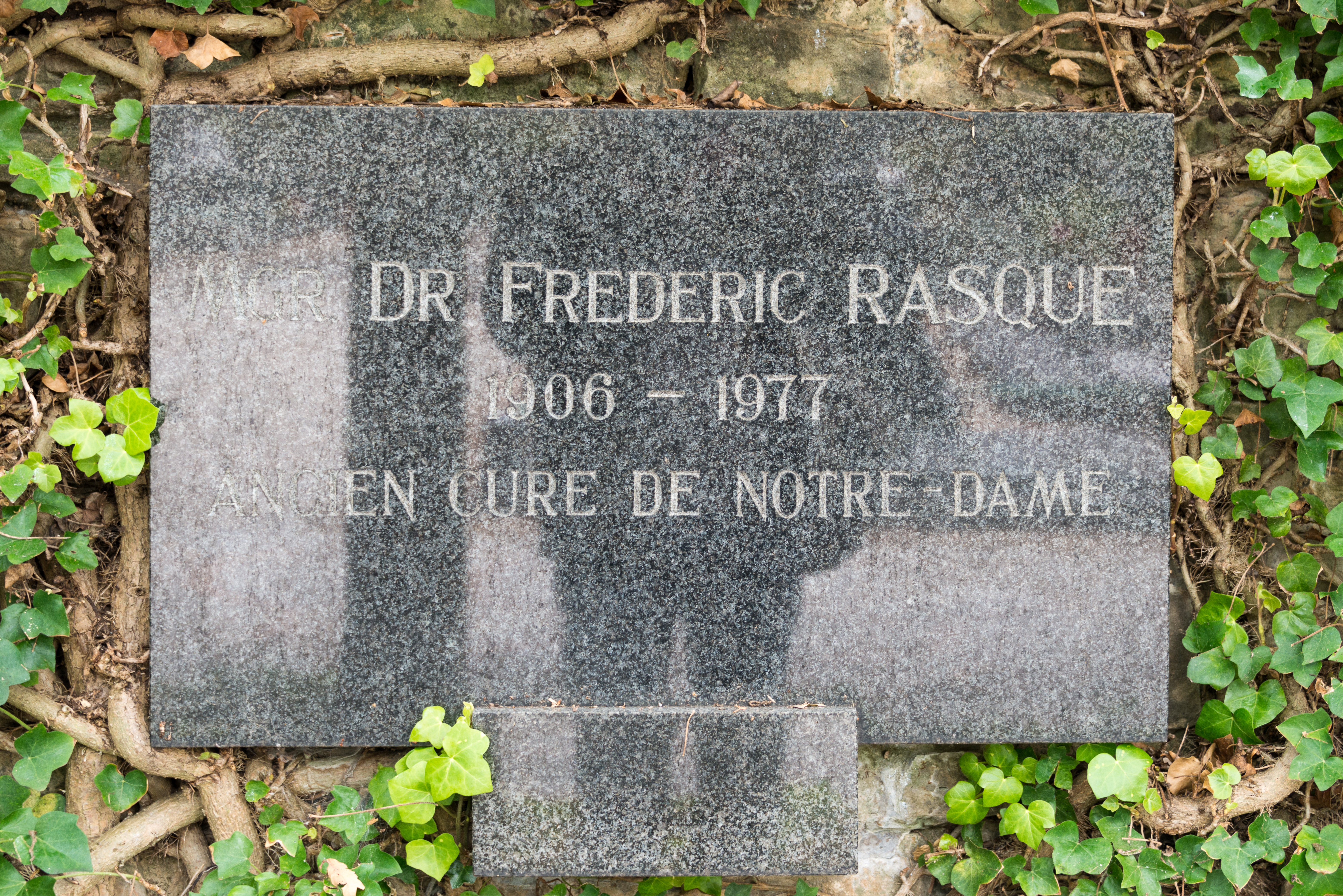 D'Graf vum Paschtouer Fritz Rasqué um Nikloskierfecht.